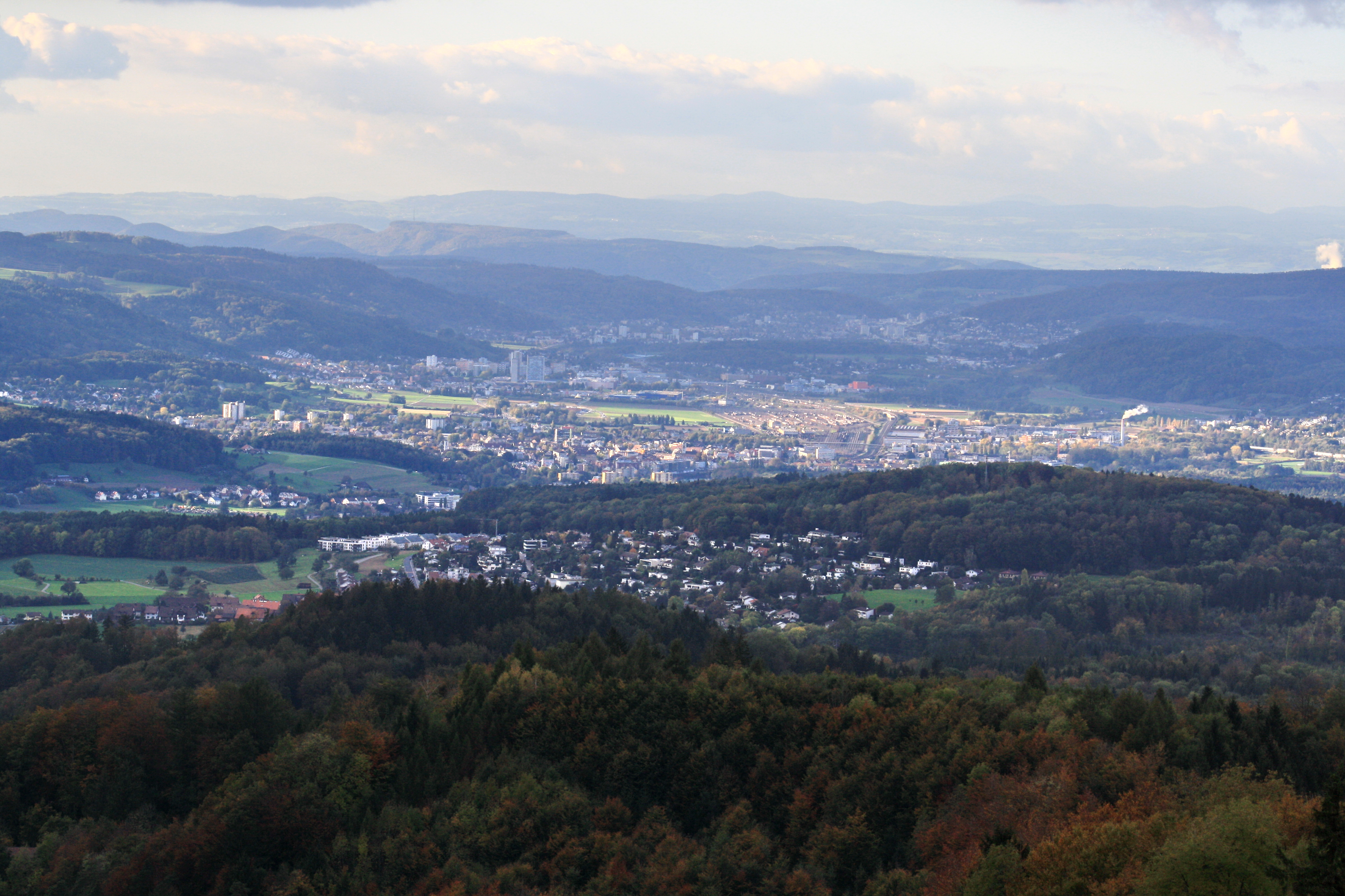 Limmattal (Limmat Valley) as seen from Uetliberg Aussichtsturm